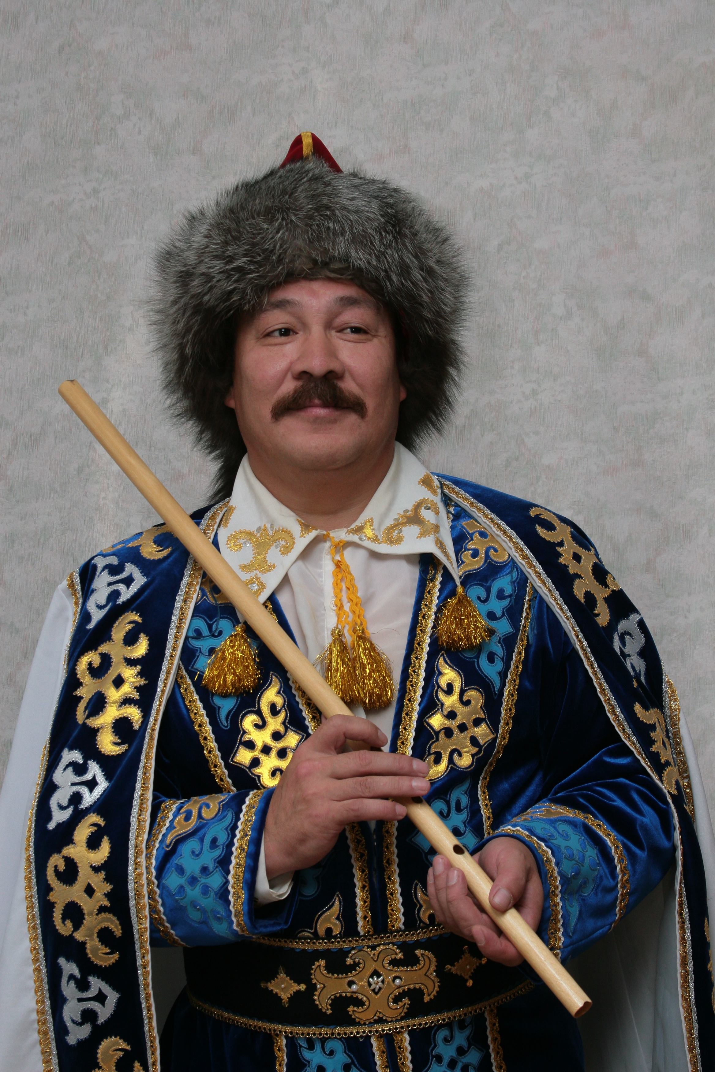 Башҡортса: Айбулат Дәүләтбай улы Рәхмәтуллин — ҡурайсы, Башҡортостан Республикаһының халыҡ артисы, Нефтекама дәүләт филармонияһының художество етәксеһе. Ансар Нуретдиновтың шехси архивынан.